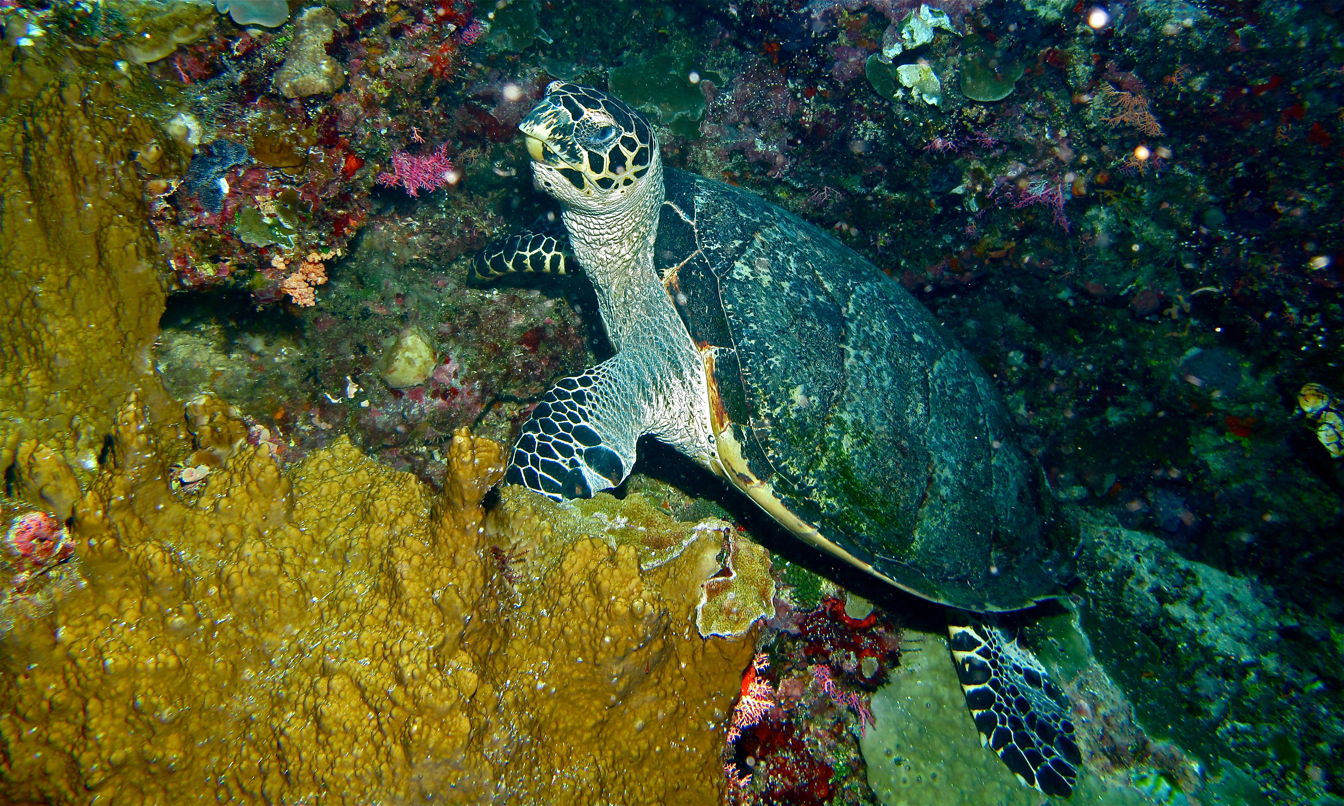 Muka, Bunaken Island, Sulawesi, INDONESIA